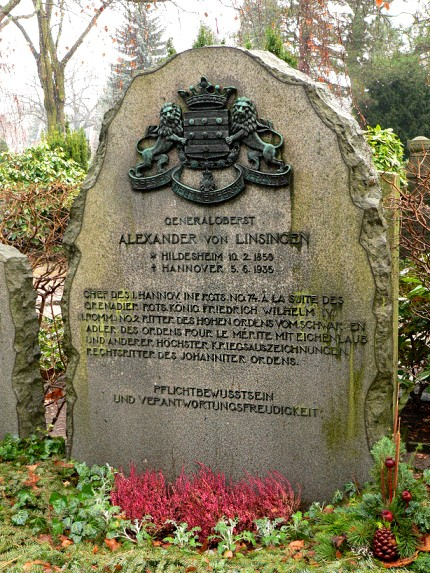 Grab von Linsingen auf Neuer Nikolai Friedhof Hannover